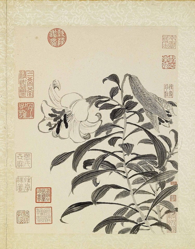 ALBUM DE PEINTURES